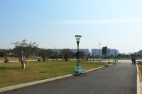 肇庆波海公园